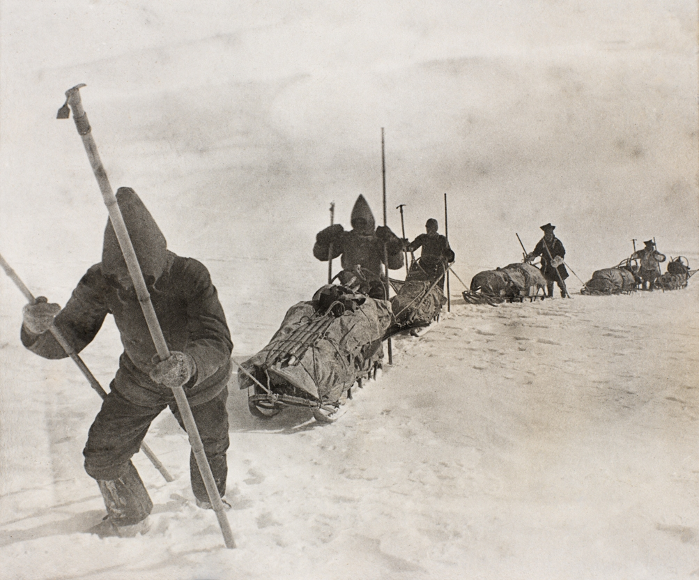 Marsjen over innlandsisen Sted / Place: Grønland Eier / Owner Institution: Nasjonalbiblioteket / National Library of Norway Lenke / Link: Bildesignatur / Image Number: bldsa_3b057